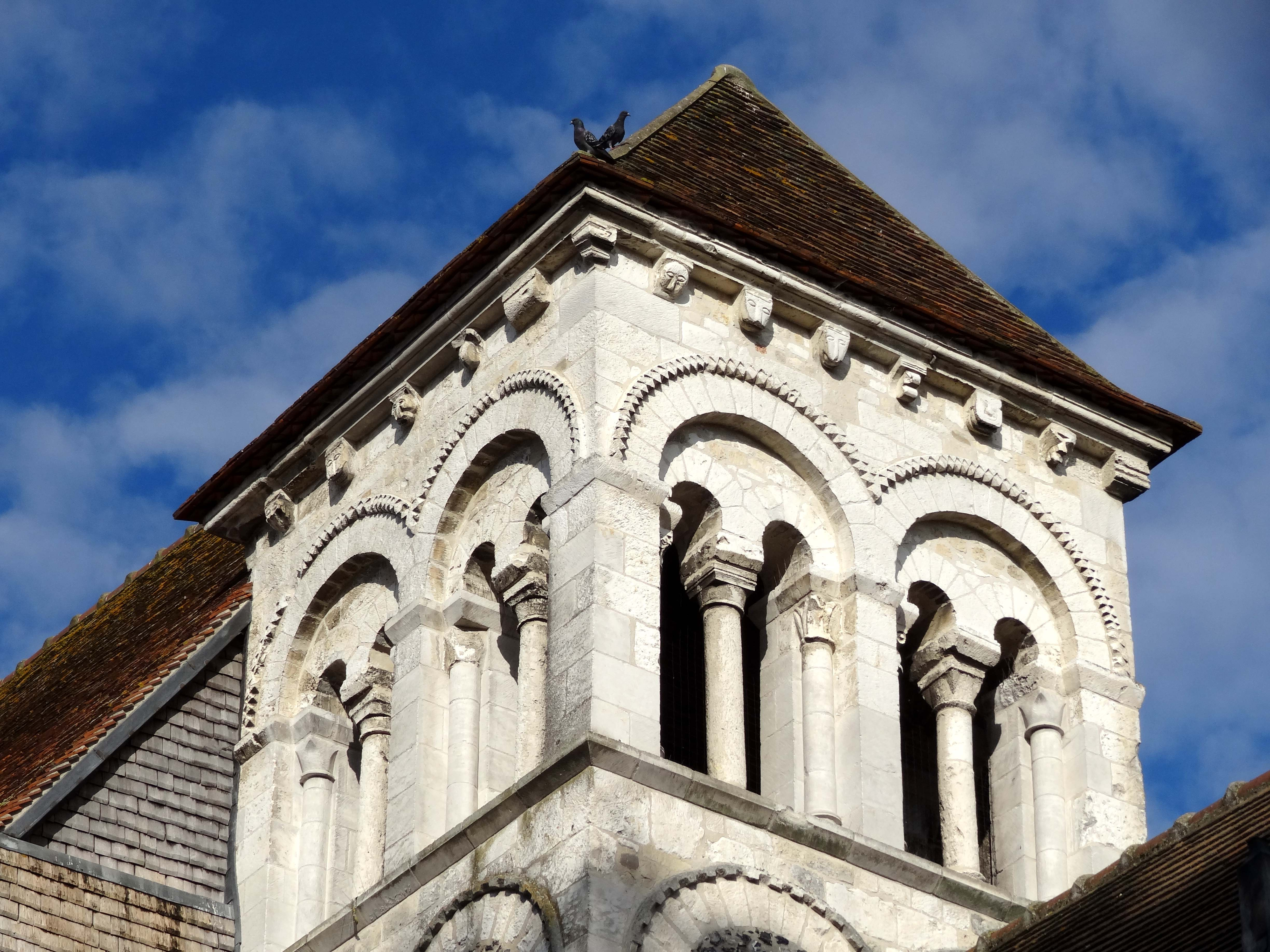 Église Notre-Dame de Marissel - voir titre.